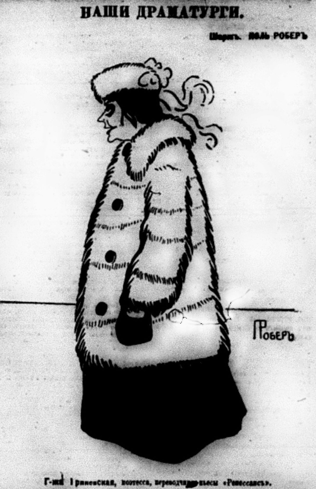 Поэтесса и переводчица Изабелла Аркадьевна Гриневская на карикатуре Поля Робера из альбома «Весь Петербург в карикатурах»